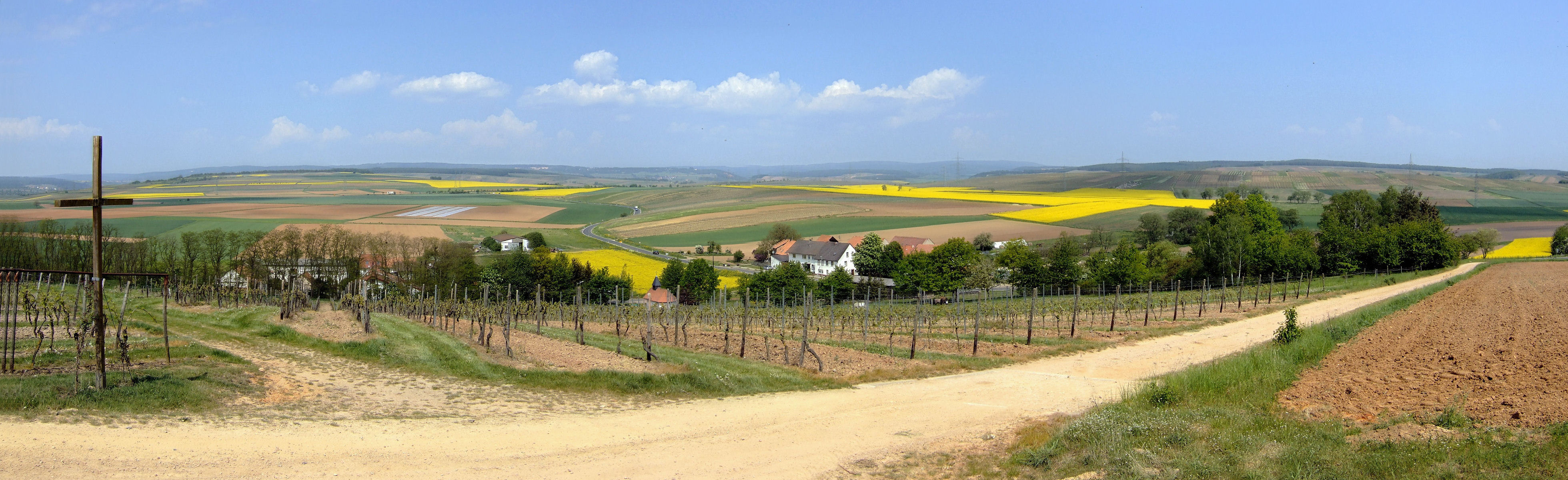 GULDENTAL Ortsteil Breitenfelserhof Panorama